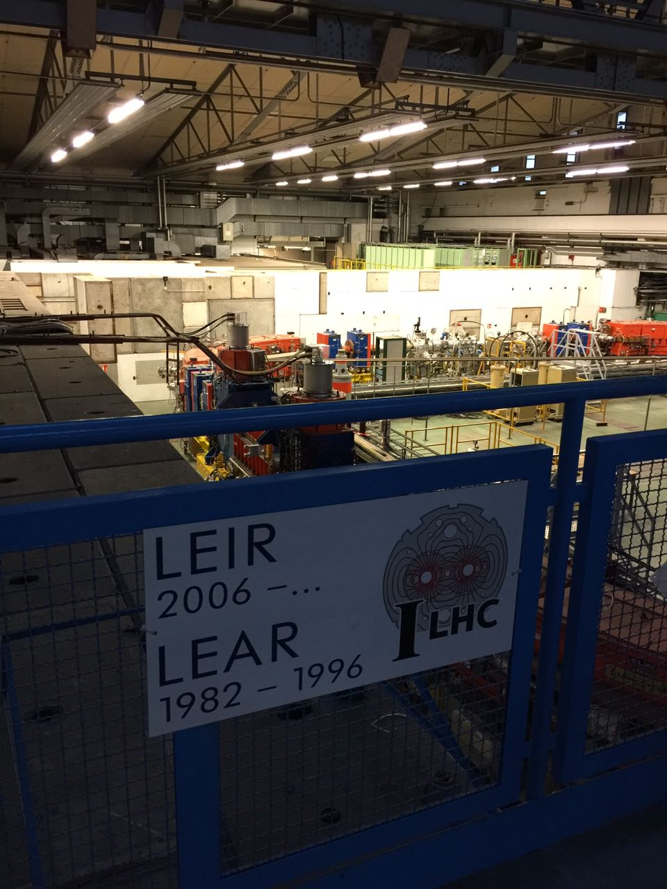 שלט המסמל את טבעת האנטי-פרוטונים באנרגיה נמוכה ואת טבעת היונים באנרגיה נמוכה